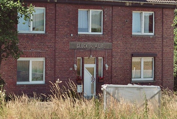 Bergmannsgruß Glück Auf am Verwaltungsgebäude der Zeche "Kleine Windmühle" in Sprockhövel, einer ehemaligen Zeche im Ruhrgebiet, Deutschland Ausschnittkopie aus Image:Kleine_Windmuehle01.jpg